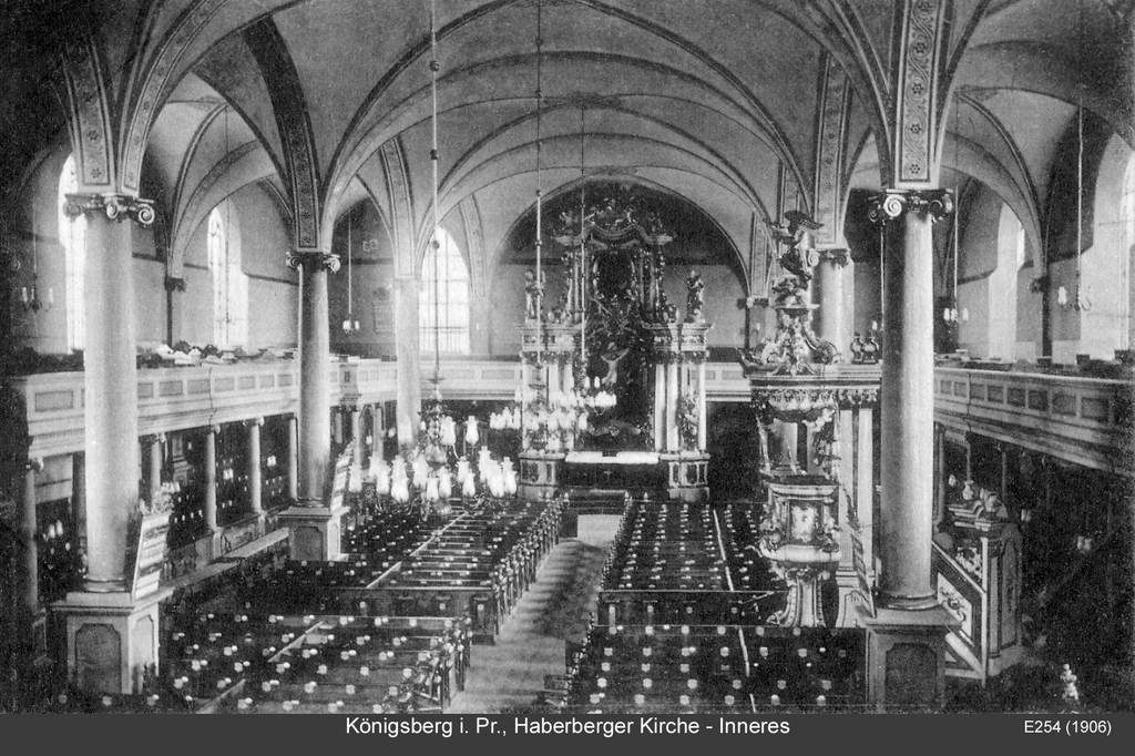 In der Haberberger Trinitas Kirche